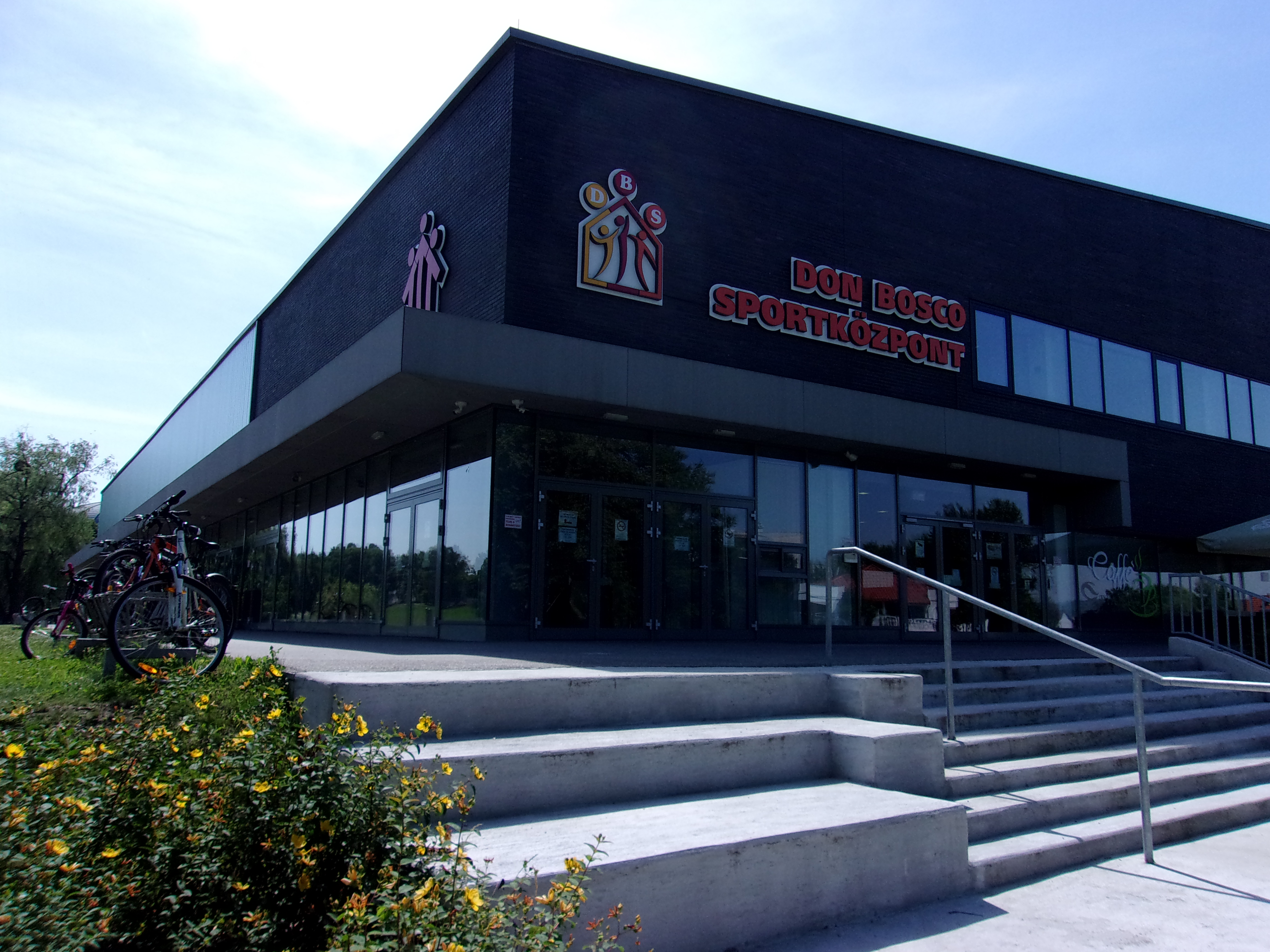 A Don Bosco Sportcsarnok Kazincbarcikán.